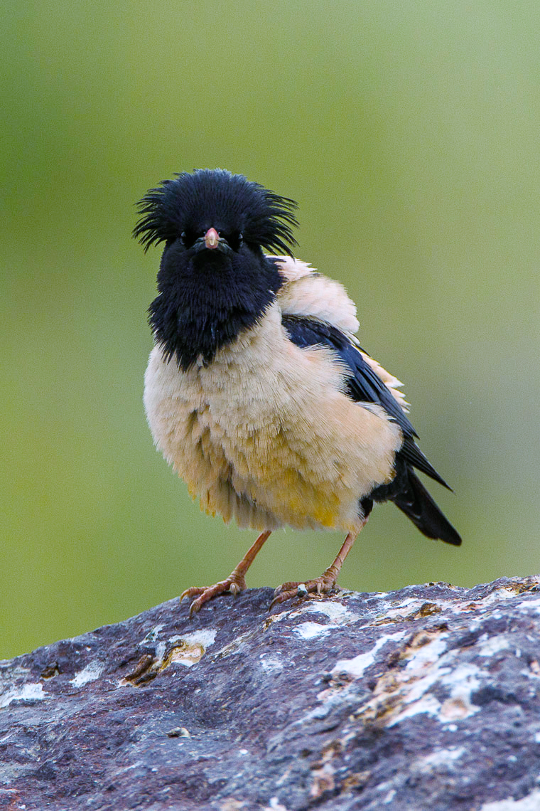 Rosy Starling - Almaty - Kazakstan_S4E1244